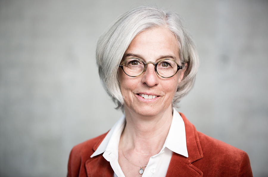 Alexandra Dinges-Dierig MdB (2014)